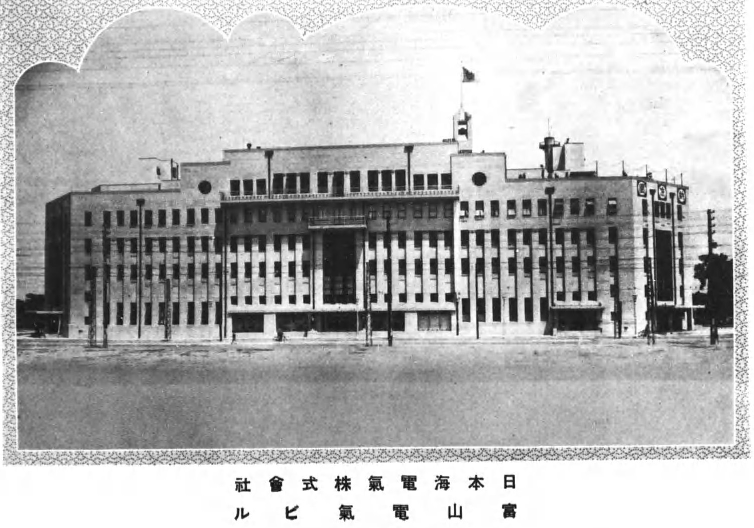 戦前の富山電気ビルディング（高岡新聞社編、『躍進富山県』、1938年（昭和13年）、高岡新聞社）